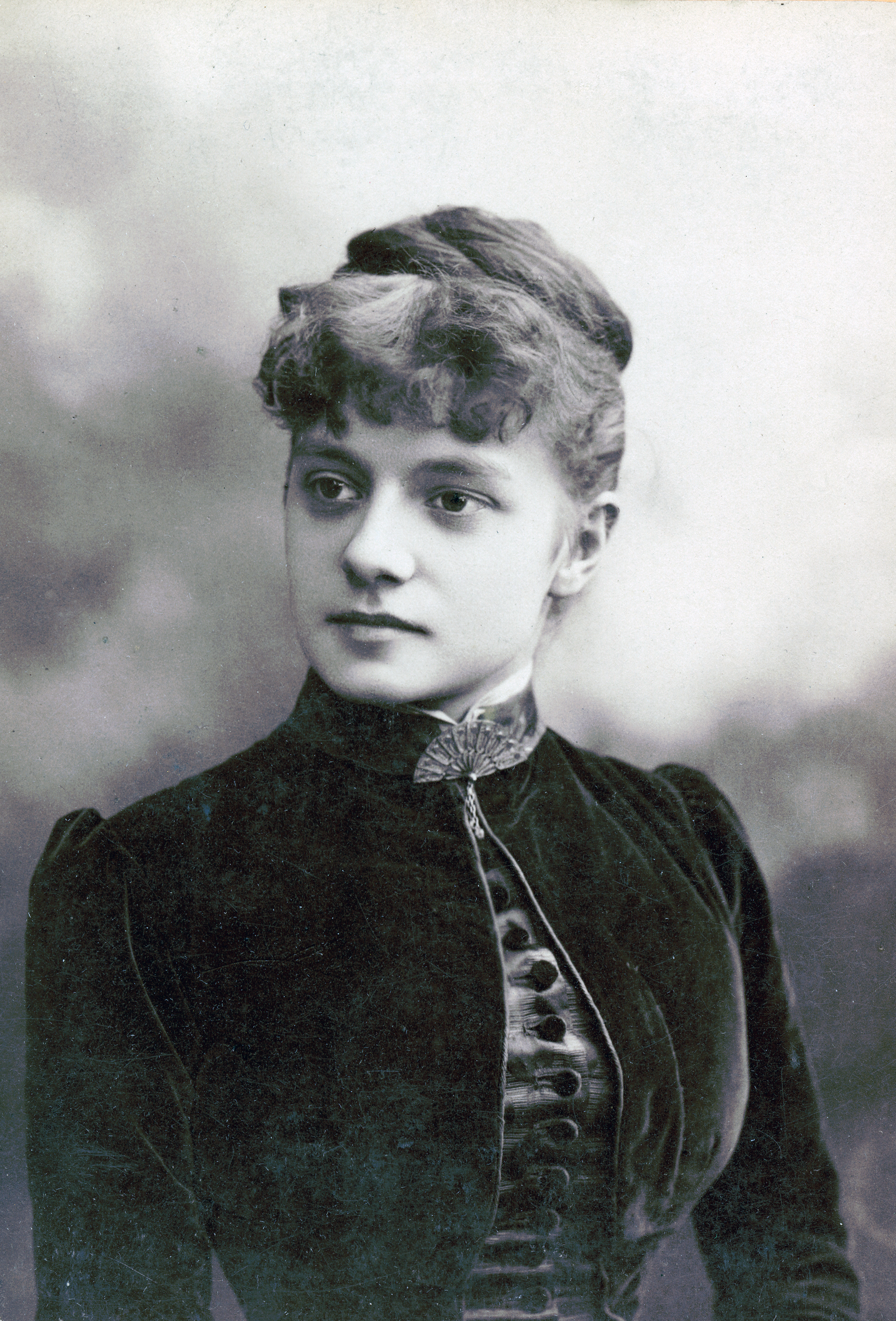 Lina Sandell, skådespelare vid Nya teatern 1885